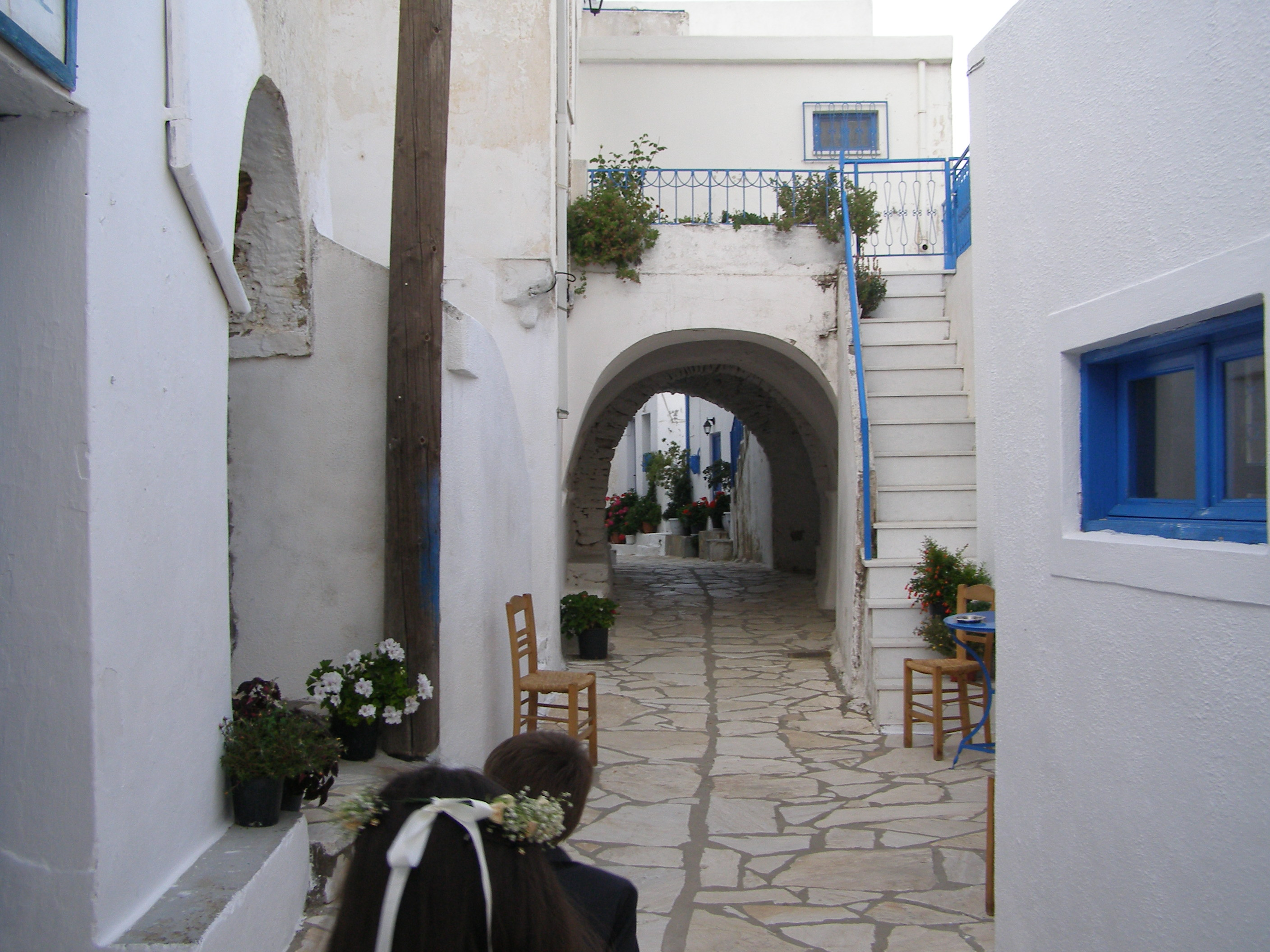 Σοκάκι της Κωμιακής